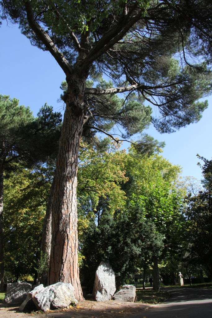 Al pie de este, roca en homenaje a Félix Rodríguez de la Fuente